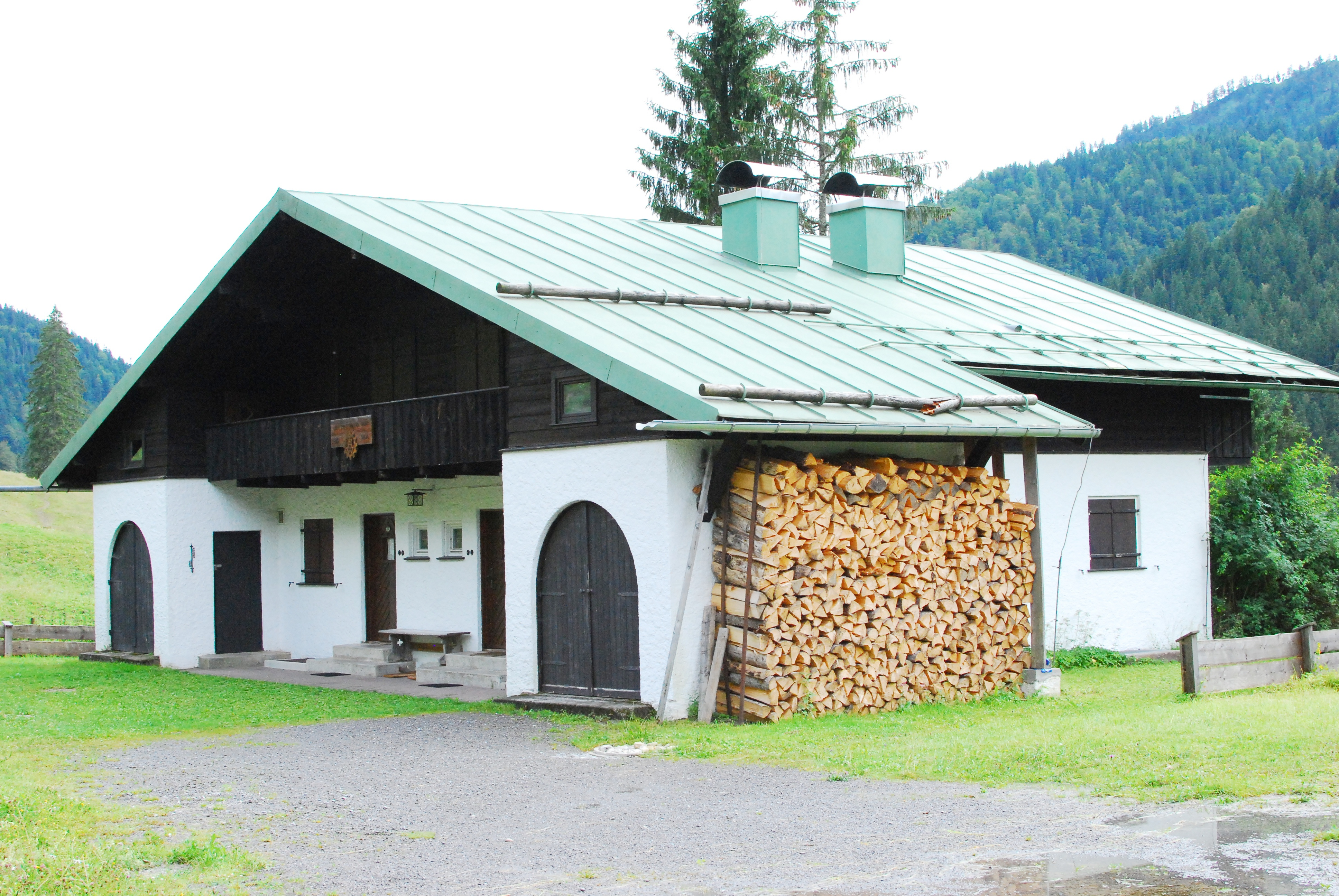 Ehemaliges Zollhaus, dann Jagdhaus Heinrich Himmler, dann THW-Unterkunftsgebäude in Valepp, Markt Schliersee, Landkreis Miesbach, Regierungsbezirk Oberbayern, Bayern.